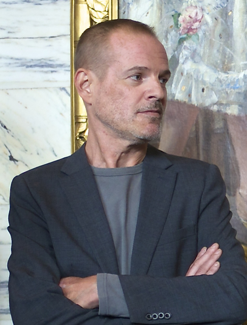 Jacob Ericksson under Dramatens höstsamling den 19 augusti 2014.